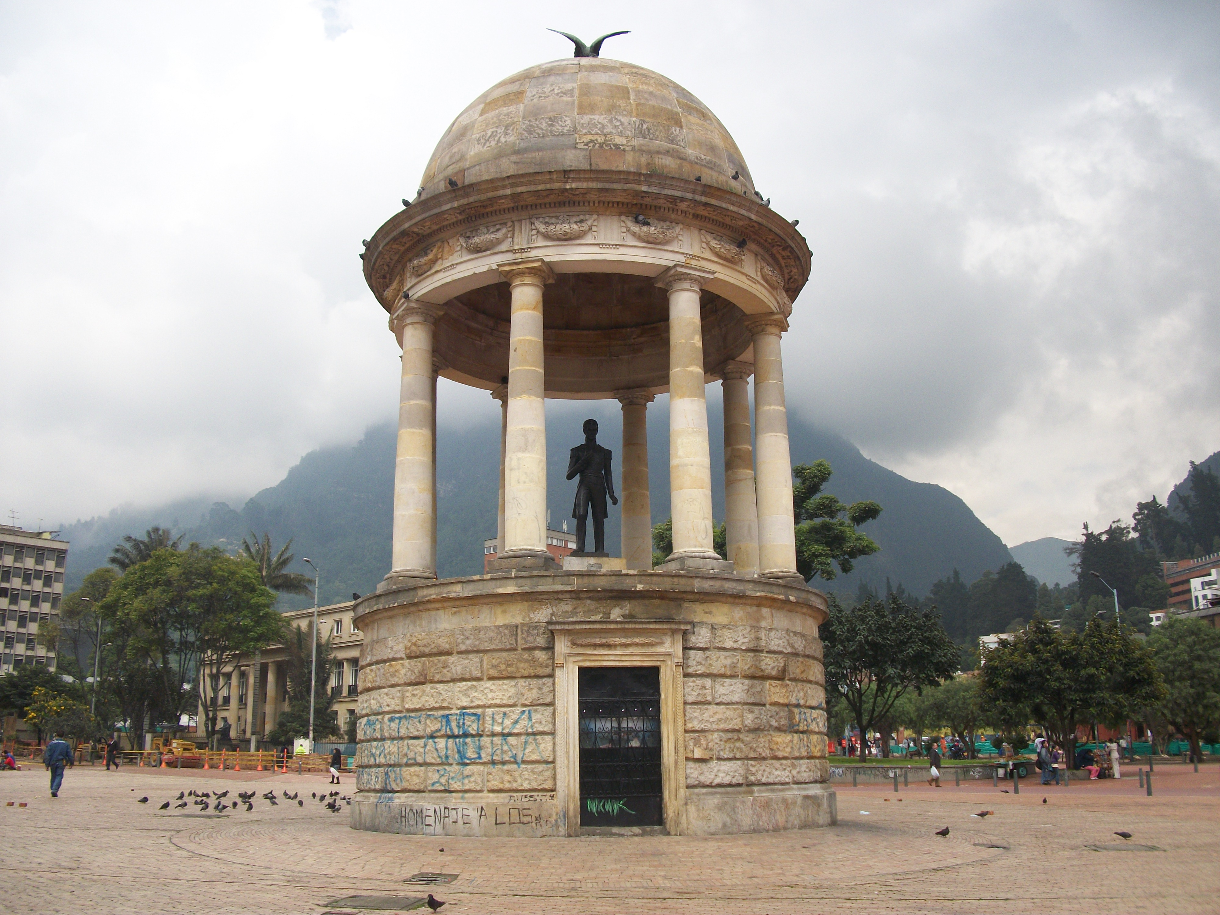 Templete del parque de los Periodistas. Detrás, edificio de la Academia Colombiana de la Lengua. Eje Ambiental, cra 17.